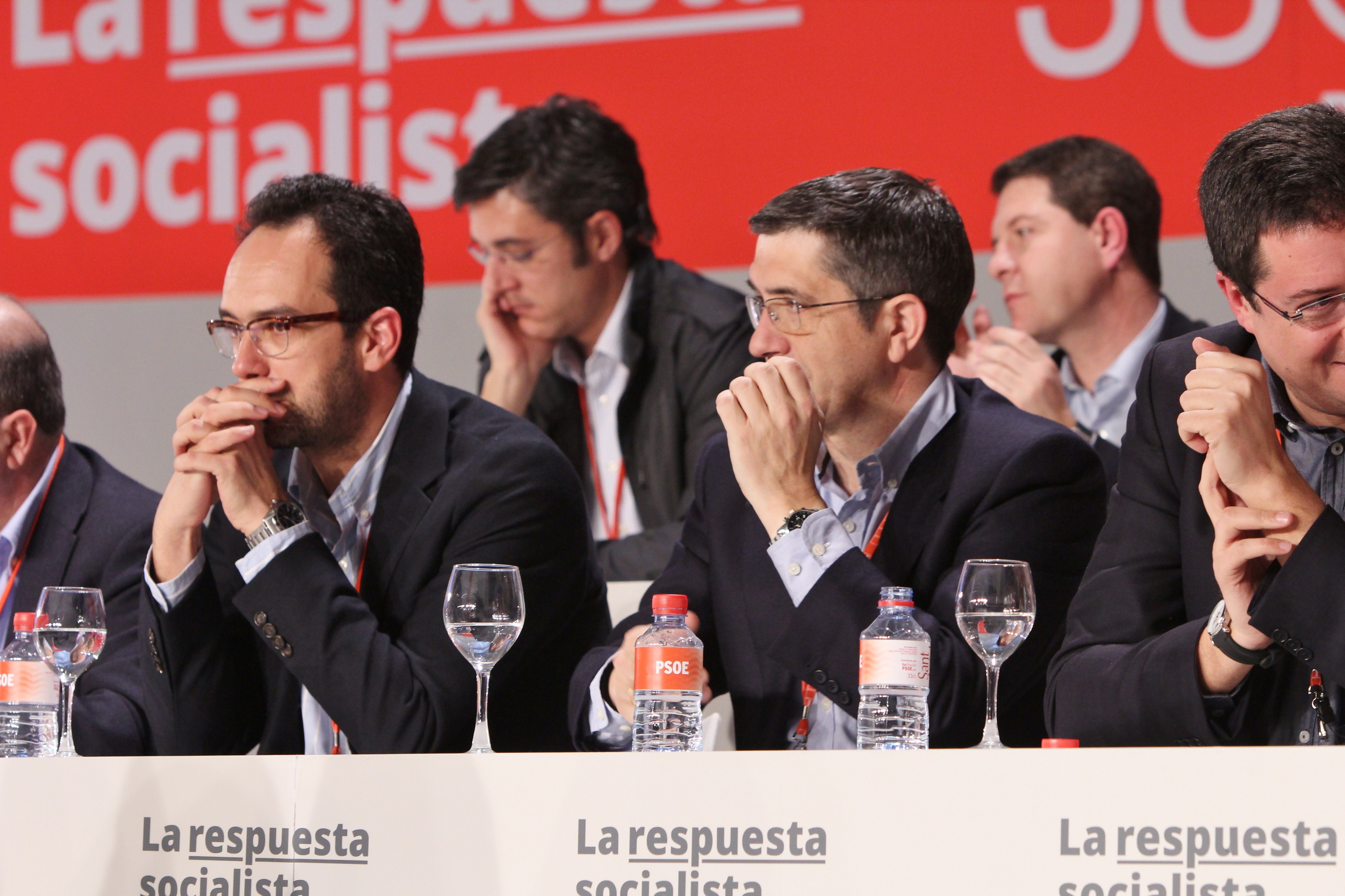 De nombreux dirigeants socialistes de premier plan lors du congrès de 2012.